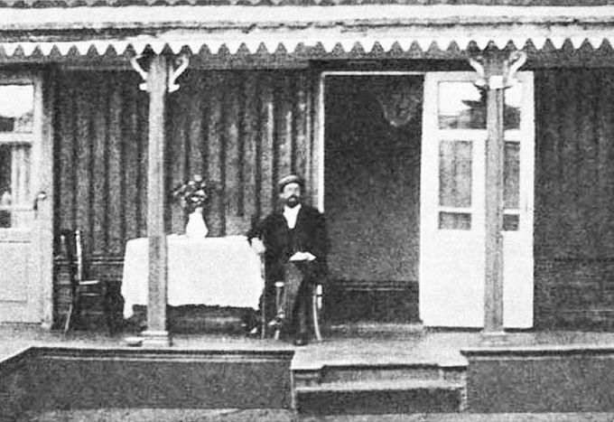 Чехов в Андреевском-санатории, 1901 год